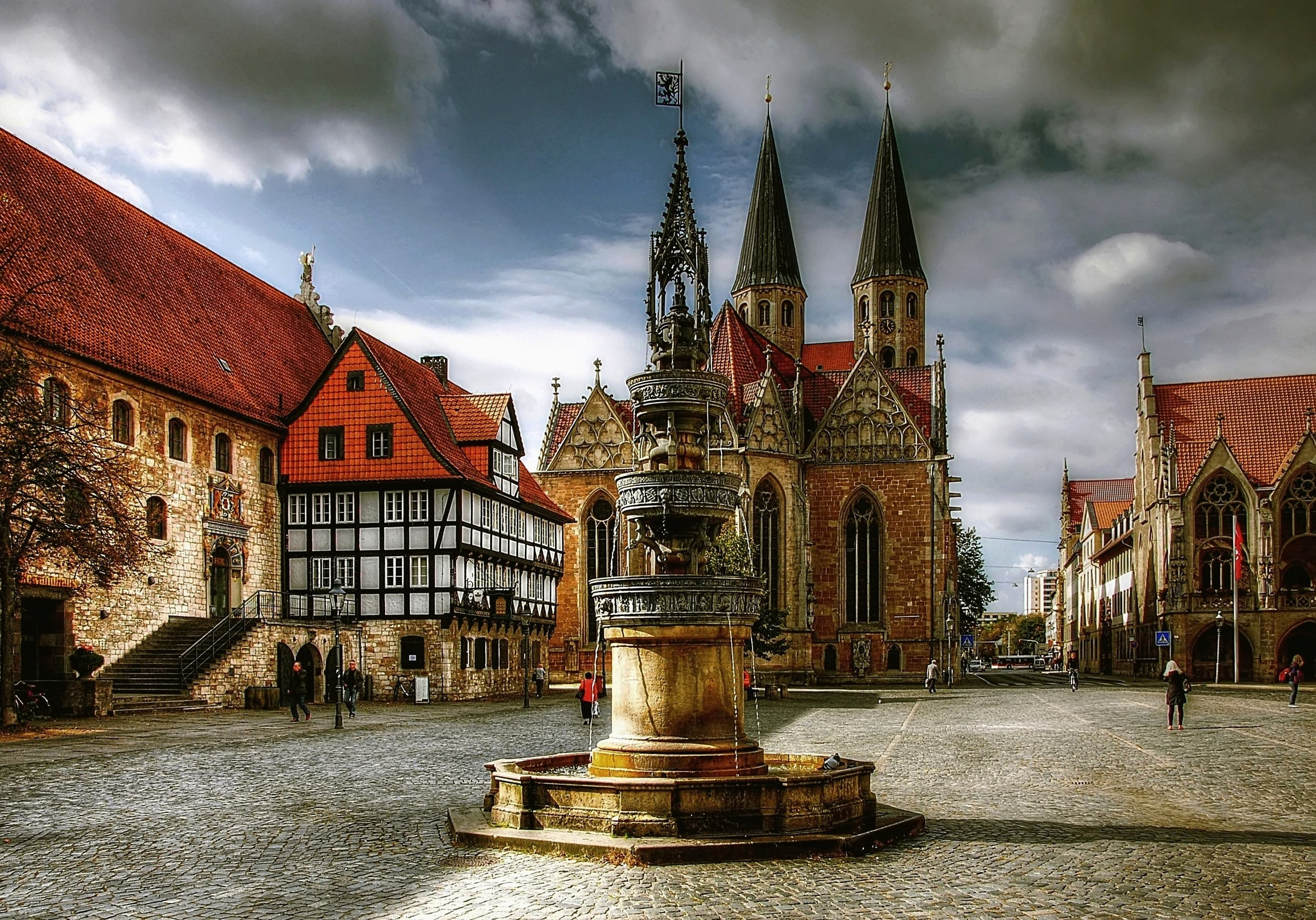 Der Braunschweiger Altstadtmarkt mit Brunnen, Gewandhaus und Martinikirche